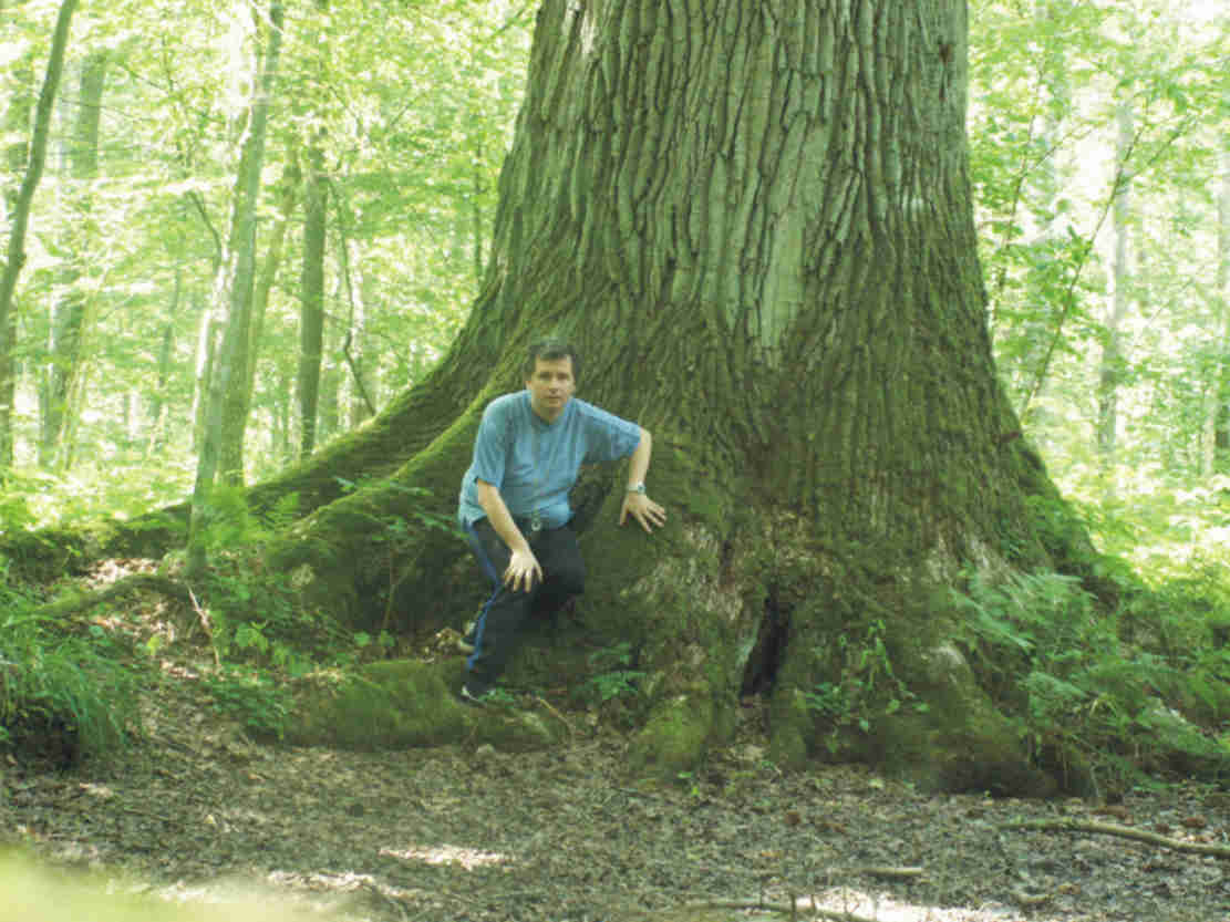 Dąb Imperator Południa.